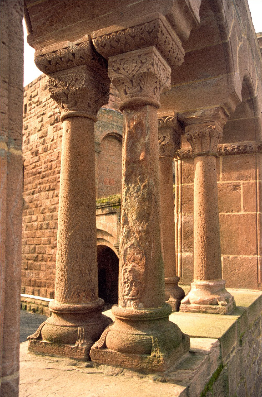 Gelnhausen - Kaiserfalz - Säulen